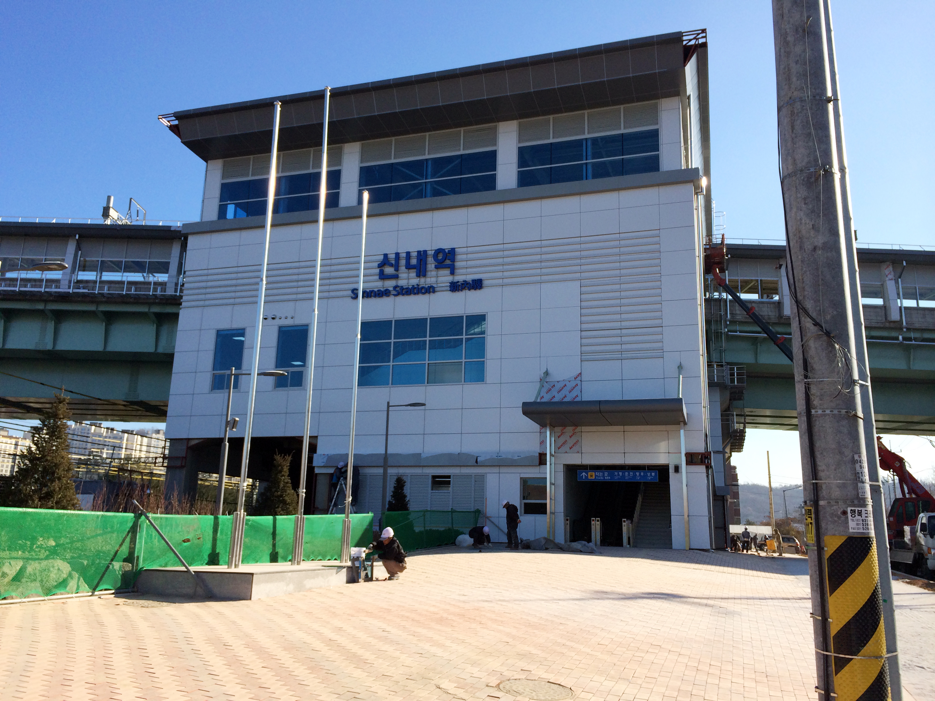 신내역 역사